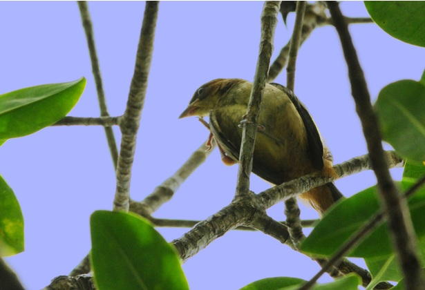 Primeira foto do filhote dessa espécie na natureza.